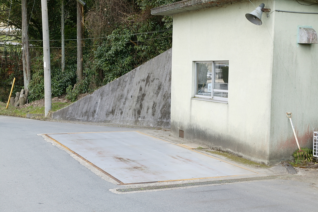 Vehicle weight scale